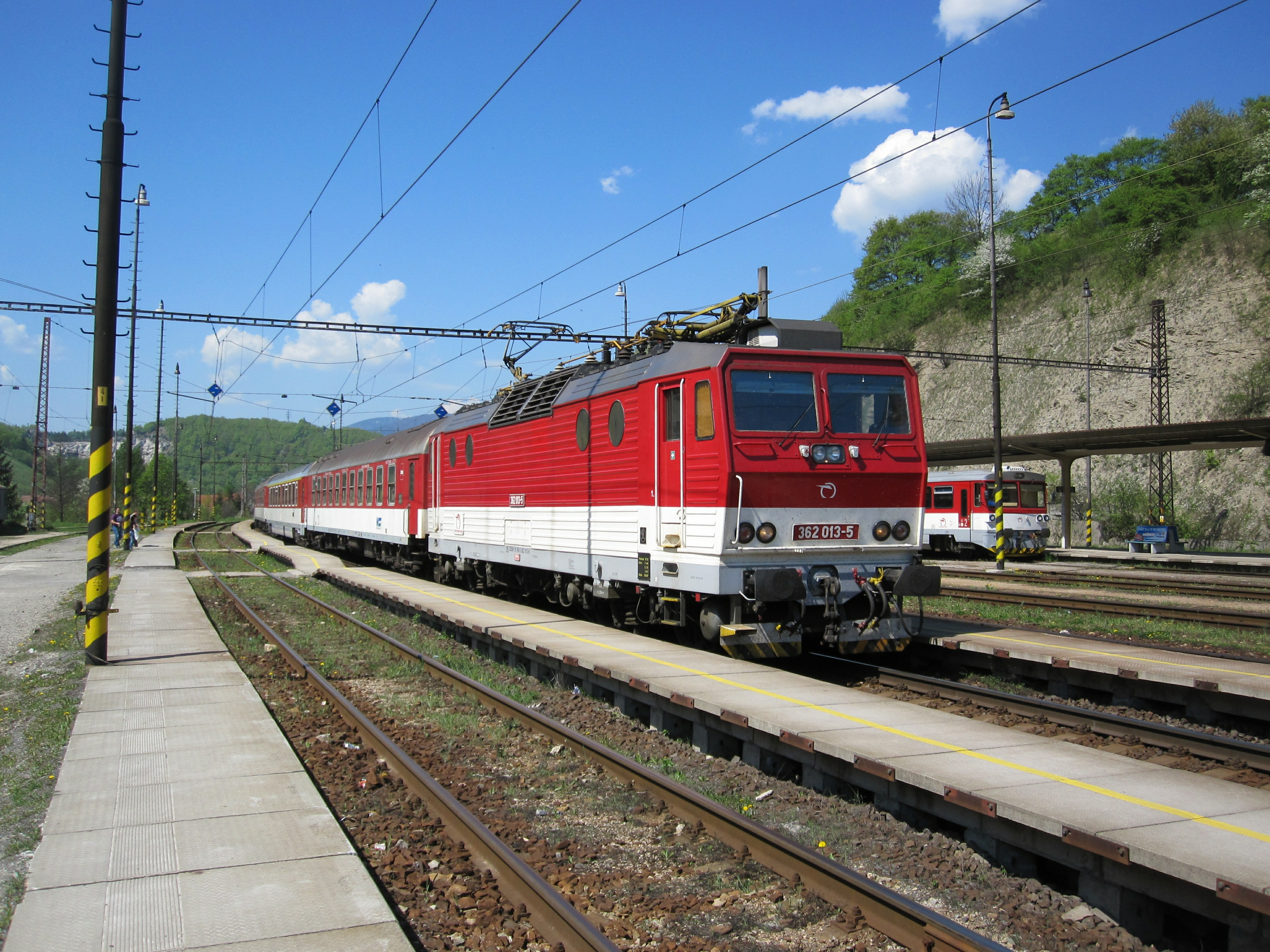 Vlak Železniční společnosti Slovensko s elektrickou lokomotivou 362.013, Kraľovany